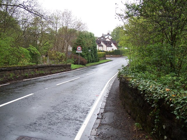 Croftamie